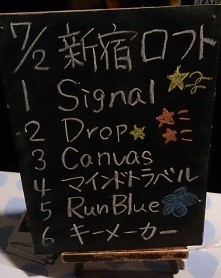 amiinaセトリボード(20150702(1))